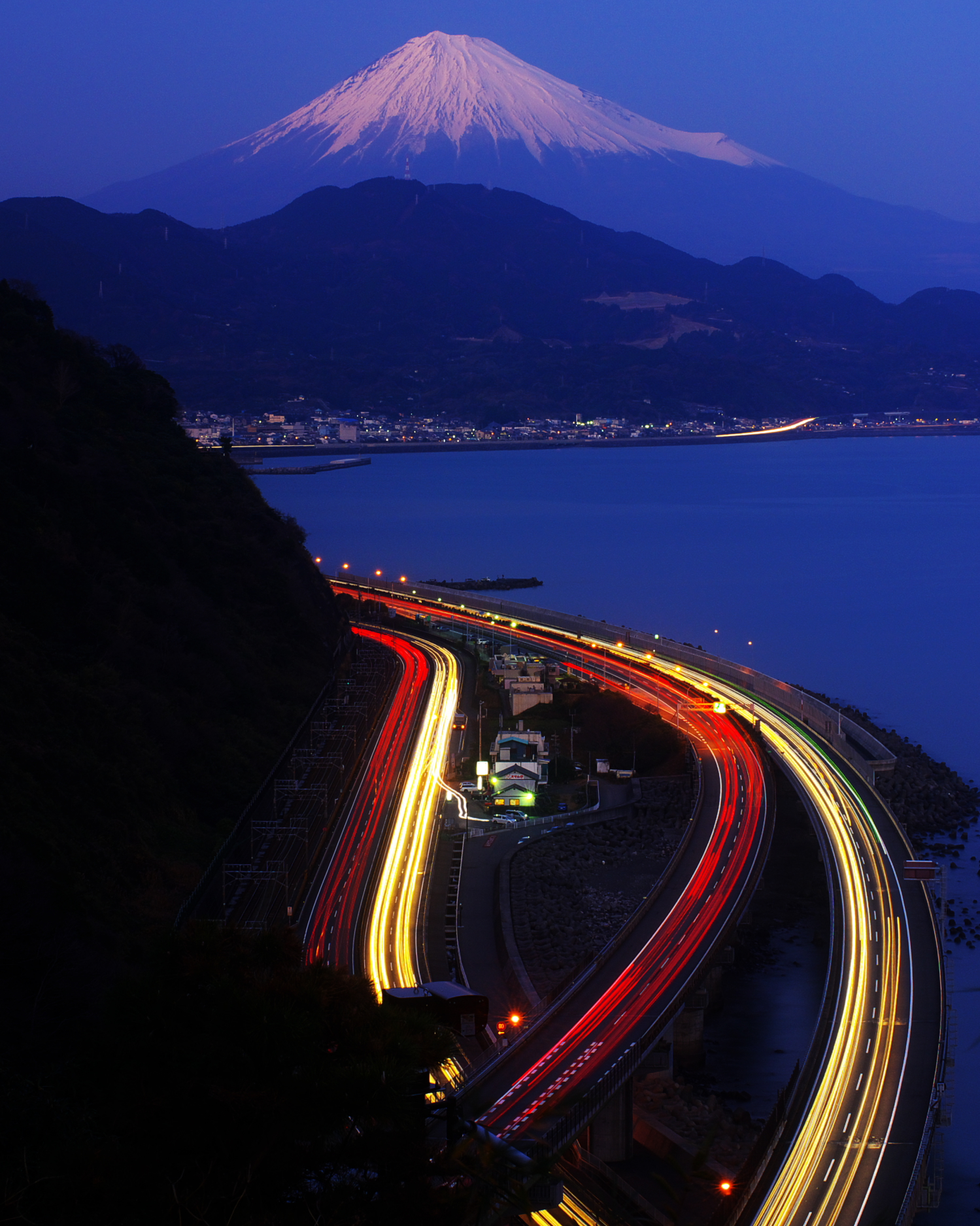 薩た峠から眺める冬の富士山。手前に右から駿河湾、東名高速道路、国道1号線、JR東海道本線が並ぶ。